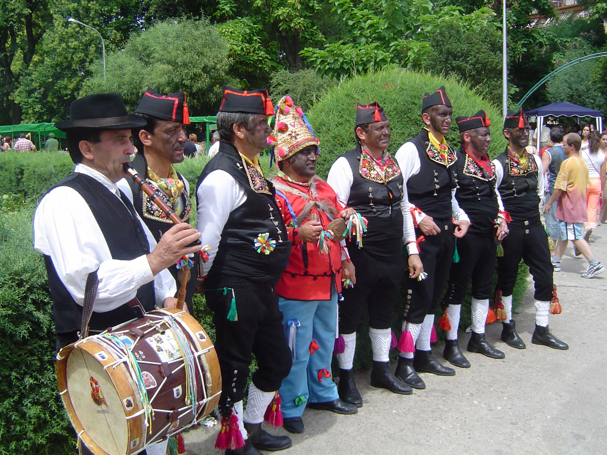 Danzantes de Montehermoso (Cáceres), conocidos como "Los negritos".